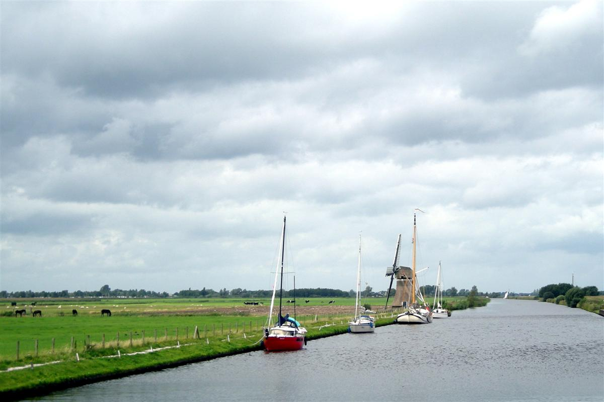 kanaal Scharsterrijn (Skarster Rien) bij Scharsterbrug en de windmolen Skarrenmolen